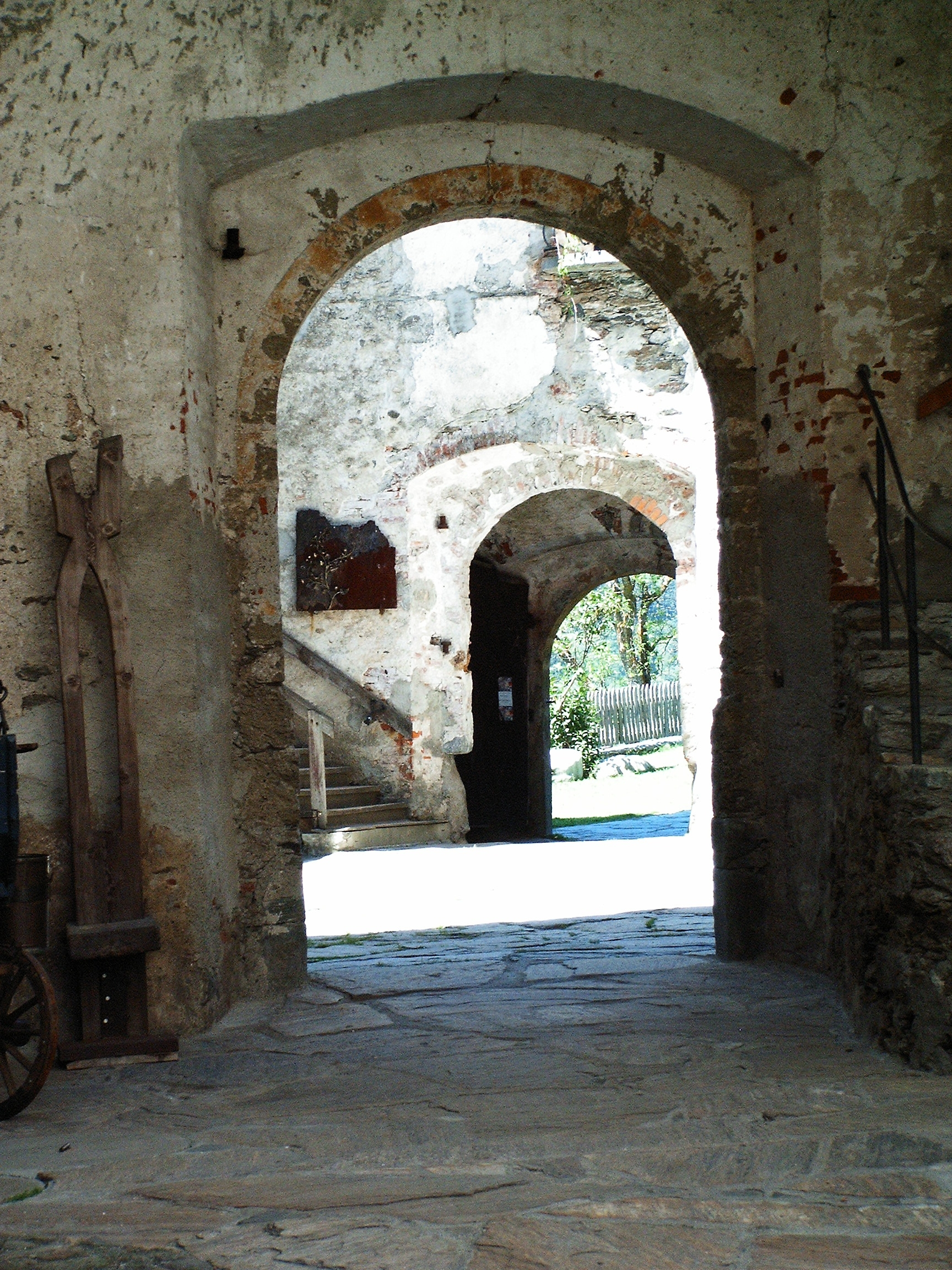 Torbögen der Burg in Gmünd / Kärnten